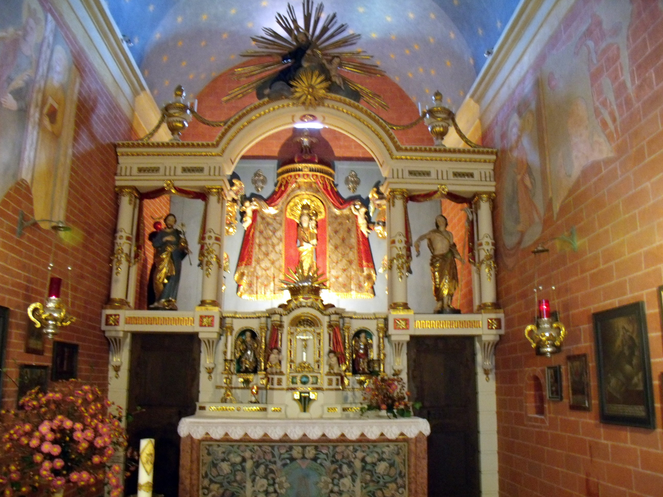 Loreto- Kapelle